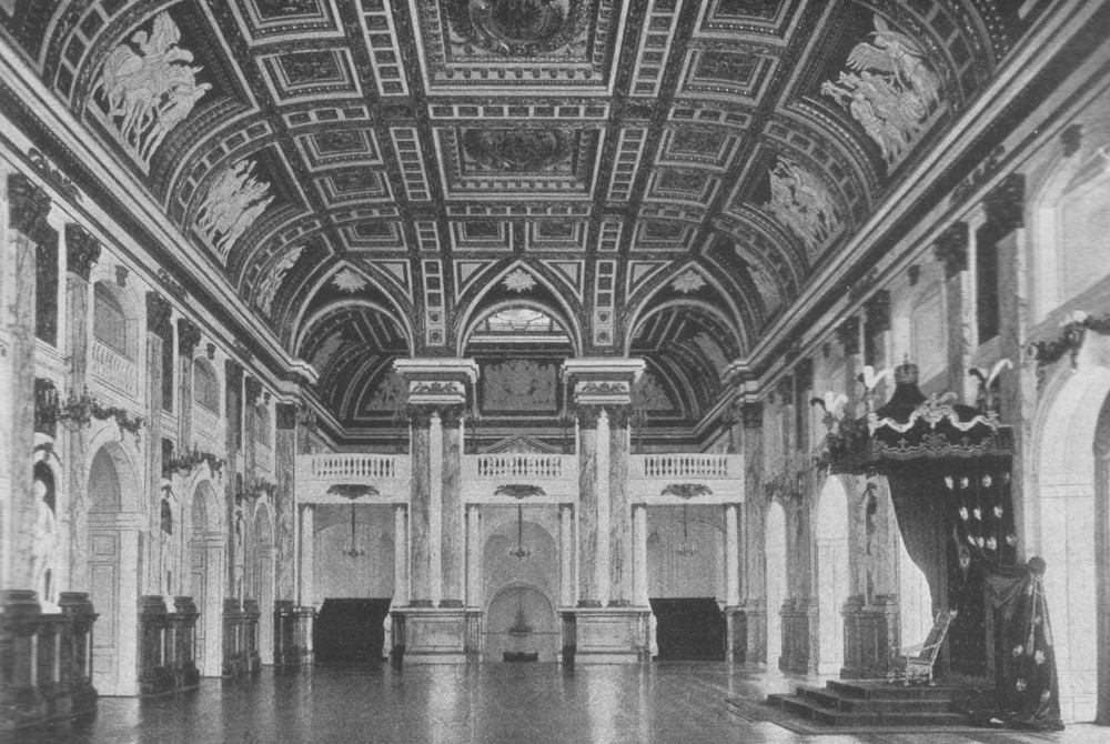 Der Weiße Saal wurde von Eosander von Göthe für den König Friedrich I. am Ende der Großen Galerie als eine neue Kapelle, über eine große Treppe erreichbar, geplant. Dessen Sohn, Friedrich Wilhelm I., ließ nach dem Tod seines Vaters die Arbeiten aus Kostengründen 1713 sofort einstellen. 1728 veranlasste Friedrich Wilhelm I. dann für den Empfang des polnischen Königs und sächsischen Kurfürsten August dem Starken den Ausbau zum Festsaal. An den Wänden wurde ein weiterer Teil des Silberschatzes zur Schau gestellt. August Stüler gestaltete im Jahre 1844 den Saal für König Friedrich Willhelm IV. vollständig neu. Nach 1892 wurde der Weiße Saal von Ernst von Ihne abermals verändert, auf eine Höhe von etwa 13 Meter gebracht und durch eine in den Schlosshof hineingeschobene Galerie erweitert. In diesem größten Saal des Schlosses wurden nicht nur Hofbälle abgehalten, sondern auch regelmäßig die Sitzungsperioden des Deutschen Reichstages eröffnet. Der Weiße Saal war nach seinem letzten Umbau ein repräsentativer Abschluss der Paradekammern.